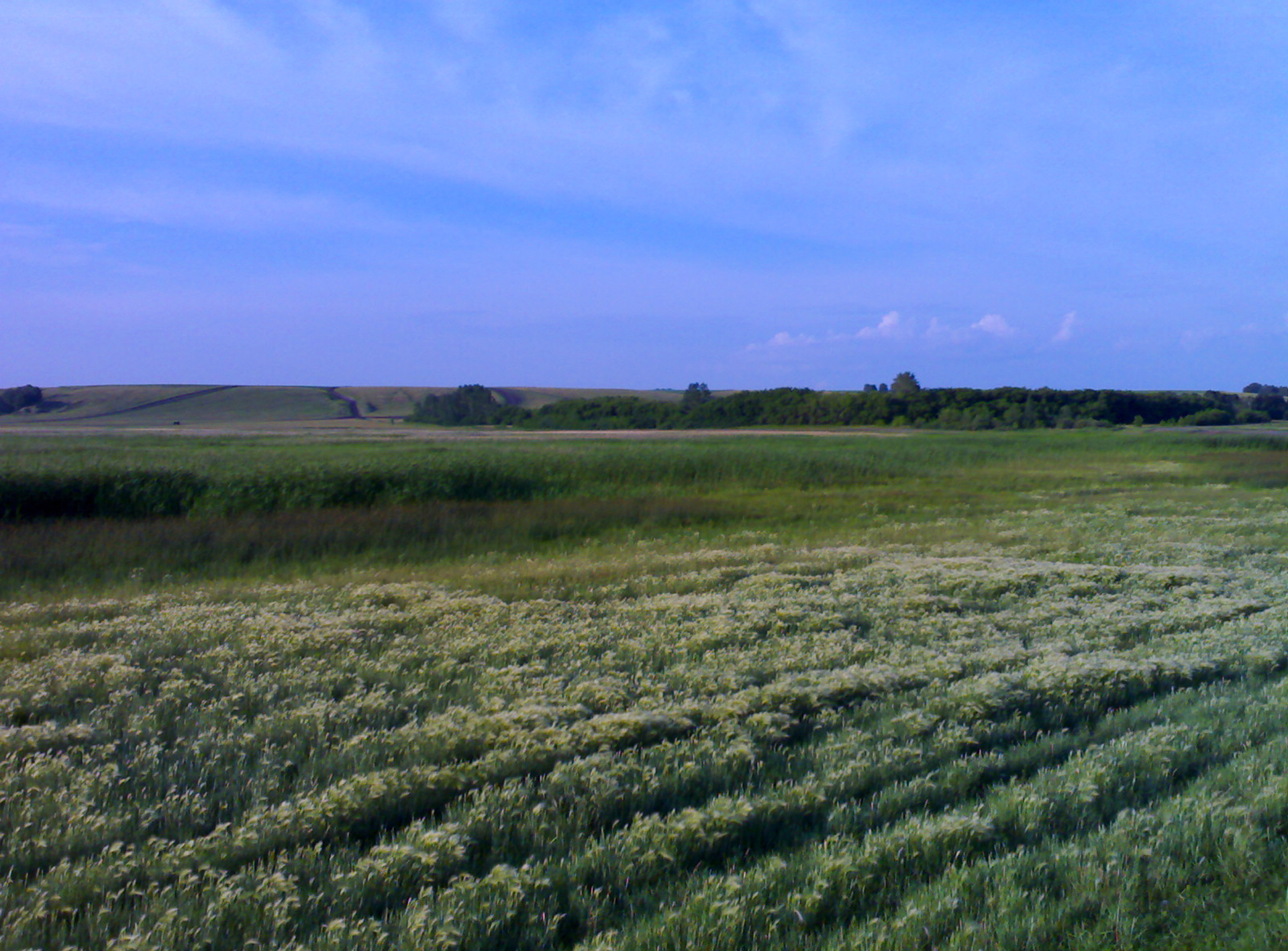 Природа окрестностей села Афонькино